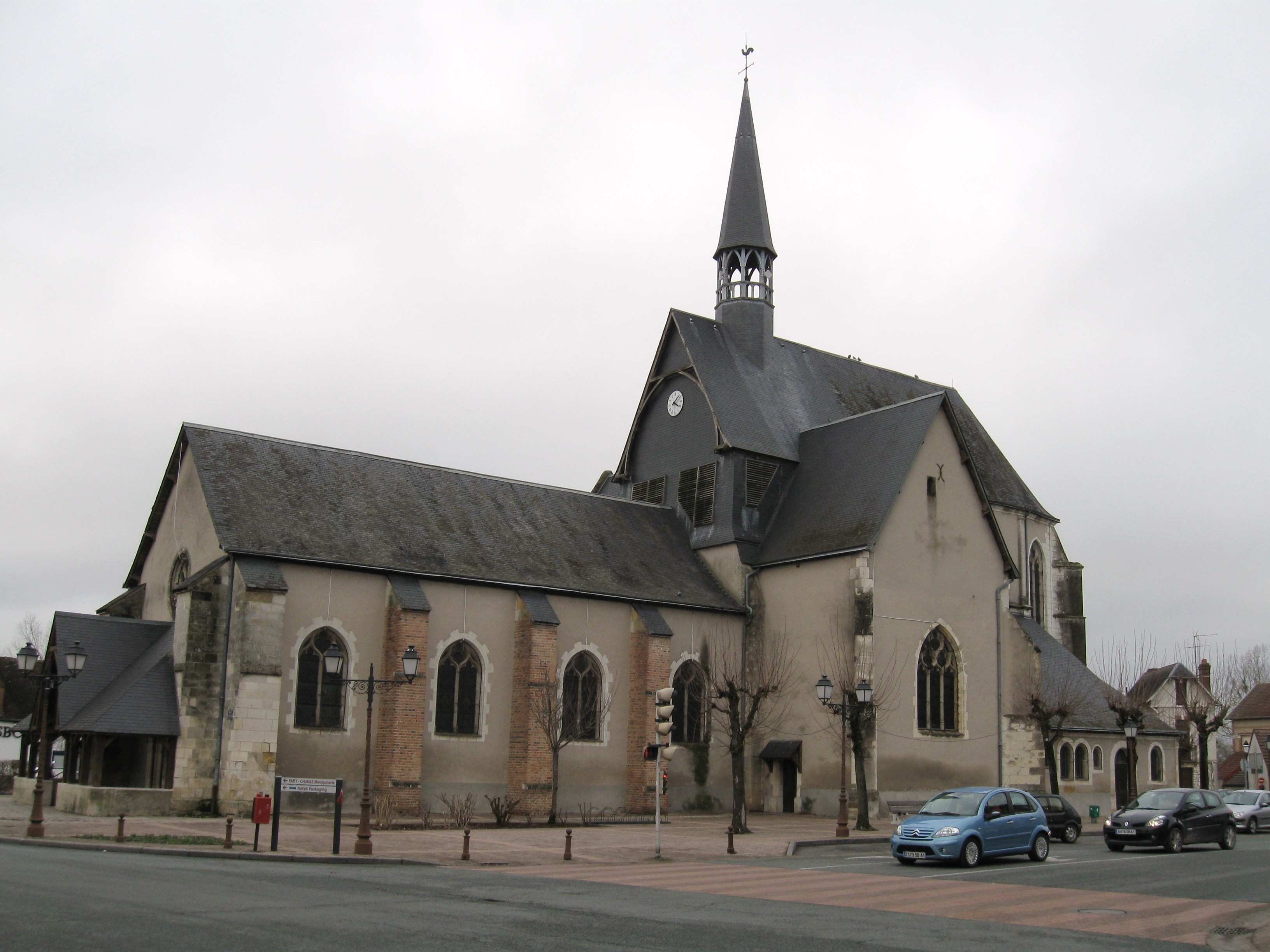 Église Saint-Georges, Salbris, Loir-et-Cher, France